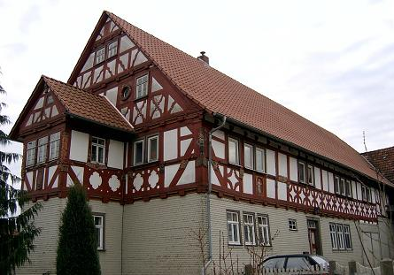 Amtshaus ("Edelhof") Crainfeld, erbaut 1685